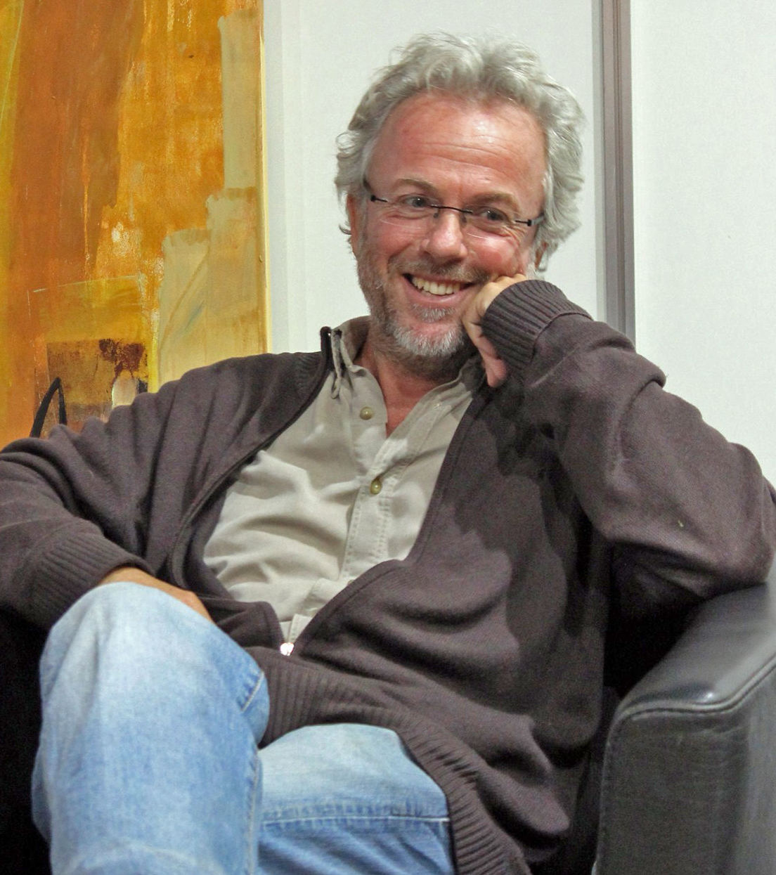 Conférence au Salon du Livre de Genève 2013